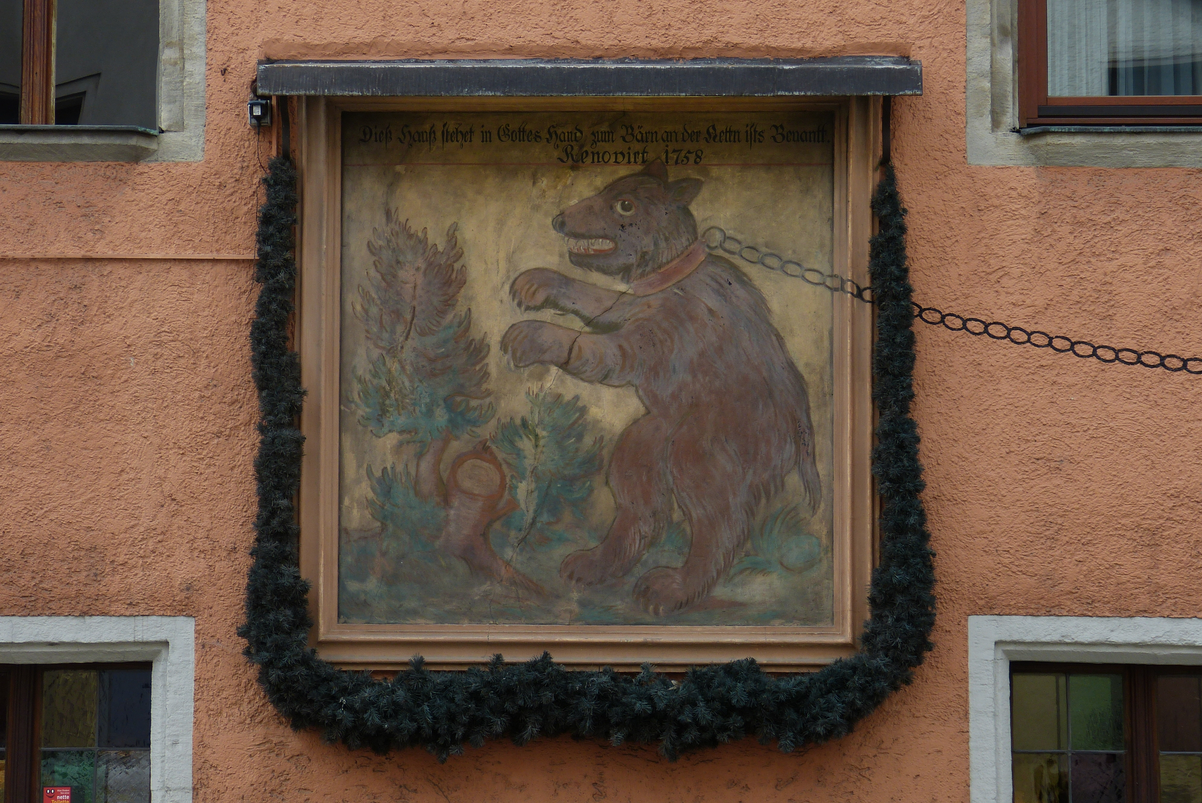 Wandbild "Bär an der Kette" am Haus Ostengasse 16 ("Brandl-Brauerei") in Regensburg.